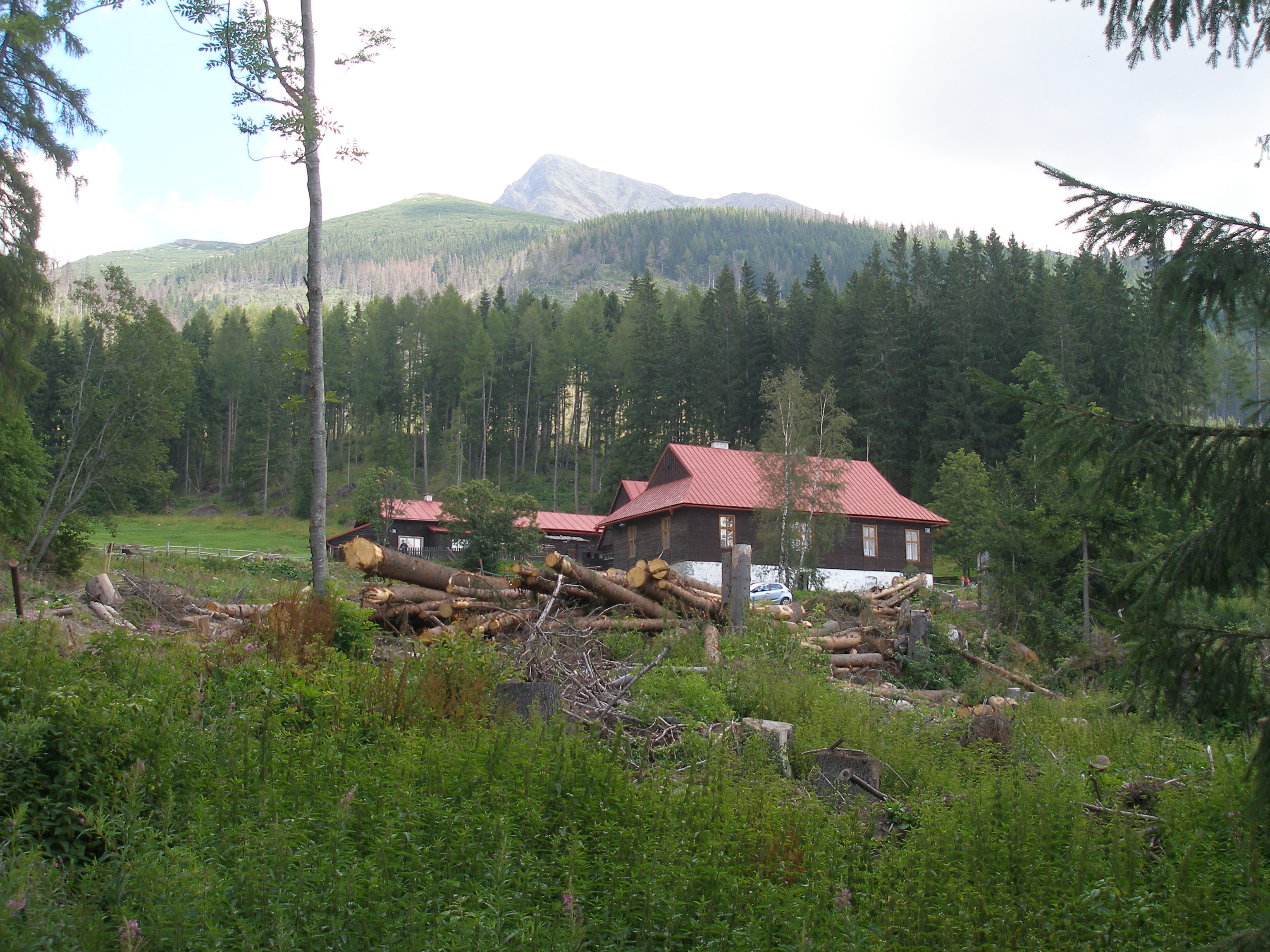 Tri Studničky, pôvodne na starých mapách označené ako Tri studne sú turisticky známym miestom pri Podbanskom vo Vysokých Tatrách. V lokalite sa nachádzajú drevené domčeky patriace lesnej správe. Pri dobrej viditeľnosti je vidieť tatranský štít Kriváň.